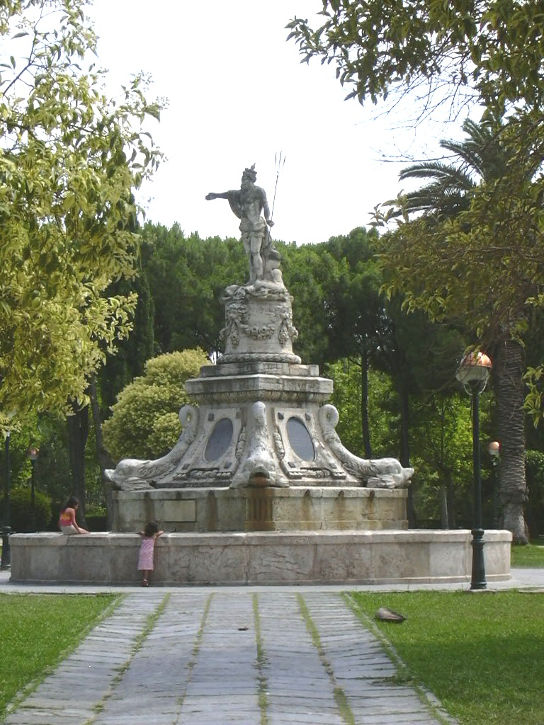 Zaragoza - Fuente de la Princesa, en el Parque Grande, 1845